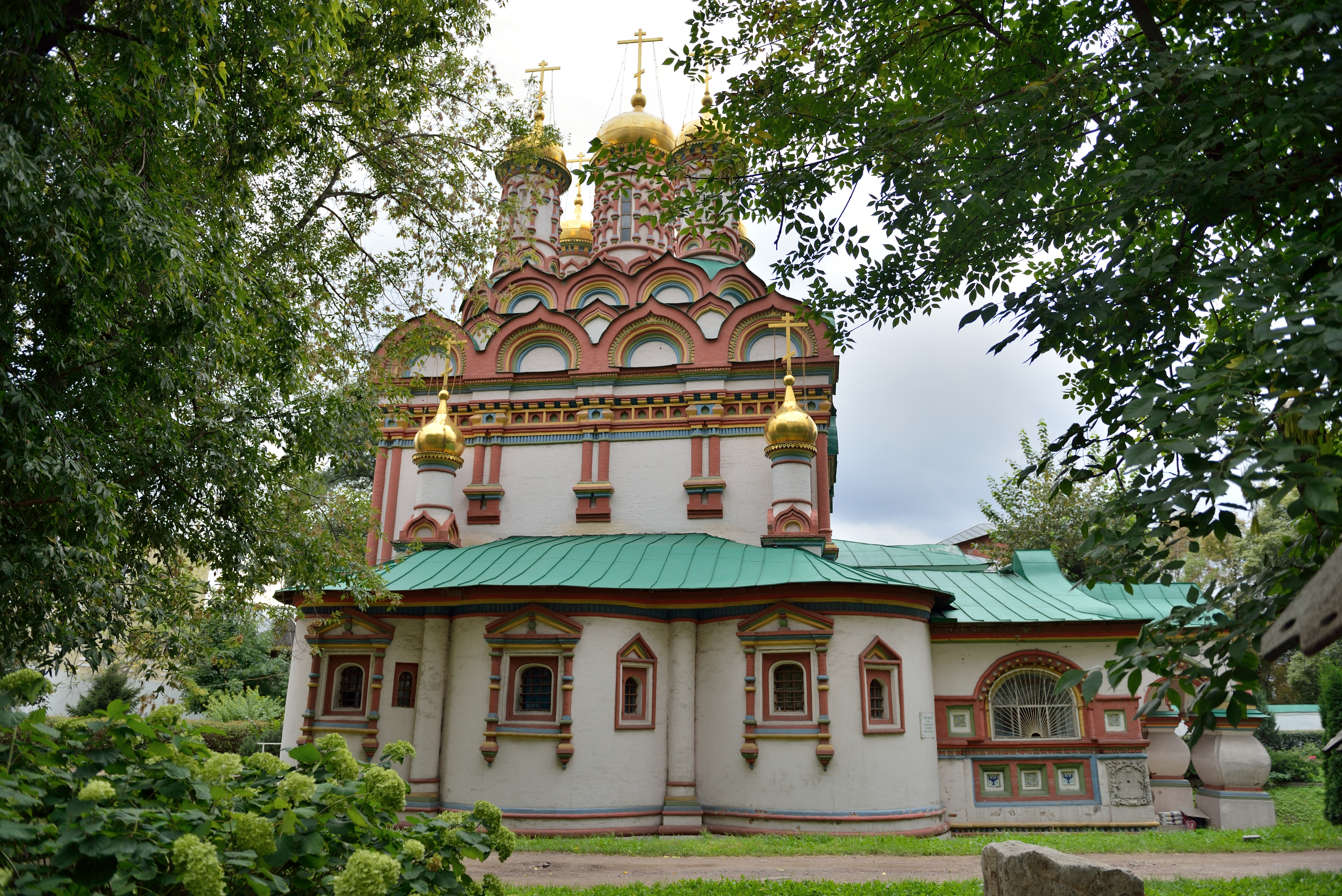 Храм Николая Чудотворца на Берсеневке, в Верхних Садовниках (на табличке памятника написано "Церковь Николы на Берсеневке")